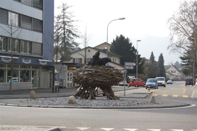 "Rabenkreisel" in Wettingen, Aargau, Schweiz